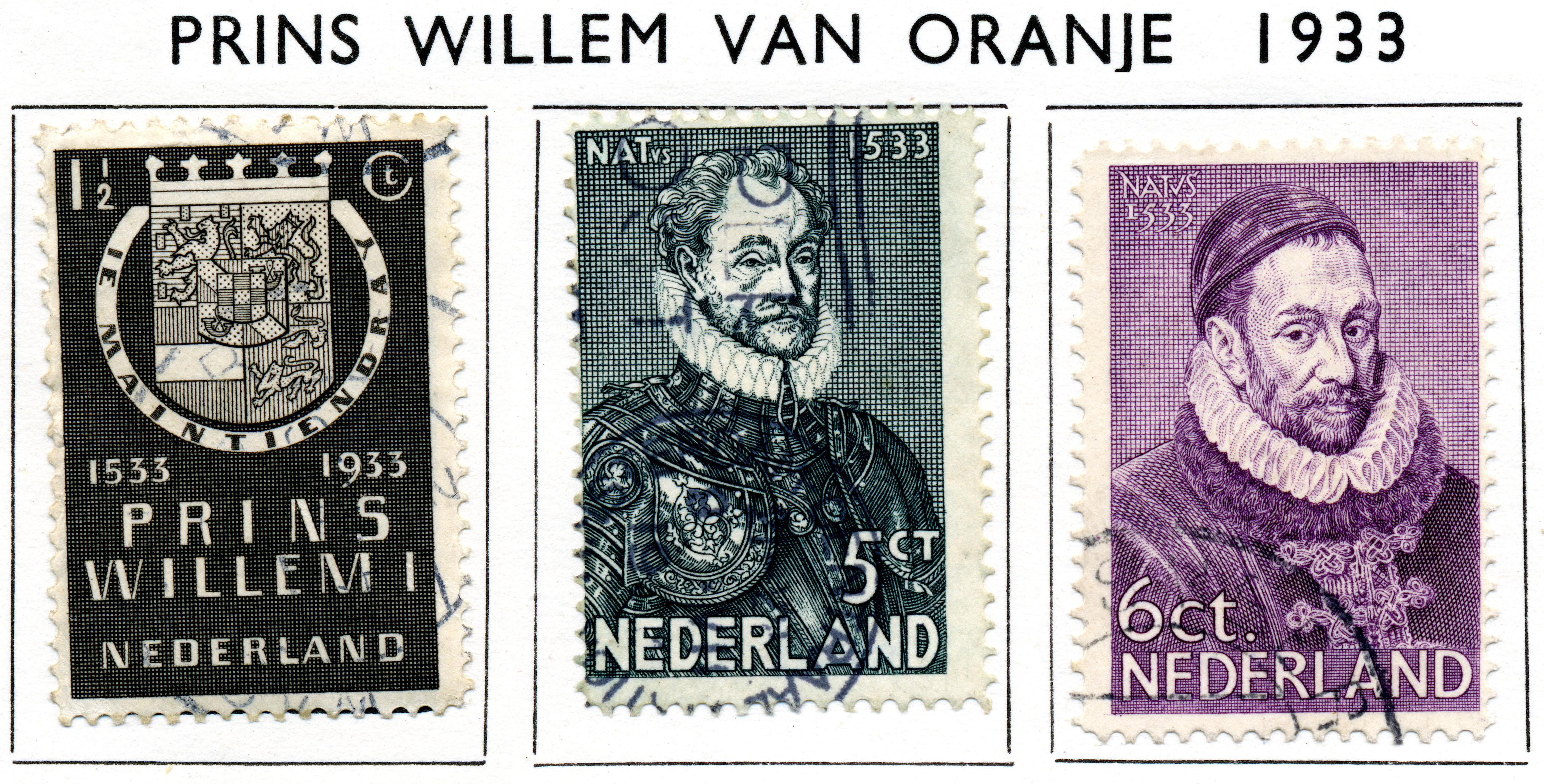 Herdenkingszegels Prins Willem I (1933). NVPH nr 252-254. Ontwerpers R.M. Wichers Wierdsma (1½ ct), P.W. van Baarsel (5 ct) en Hendrik Seegers (6 ct)